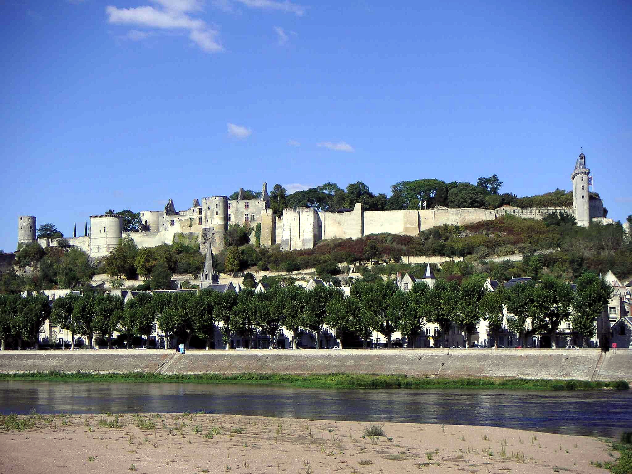 Vue du château de Chinon de la rive gauche de la Vienne. On distingue à droite la tour de l'Horloge et à gauche la tour du moulin.